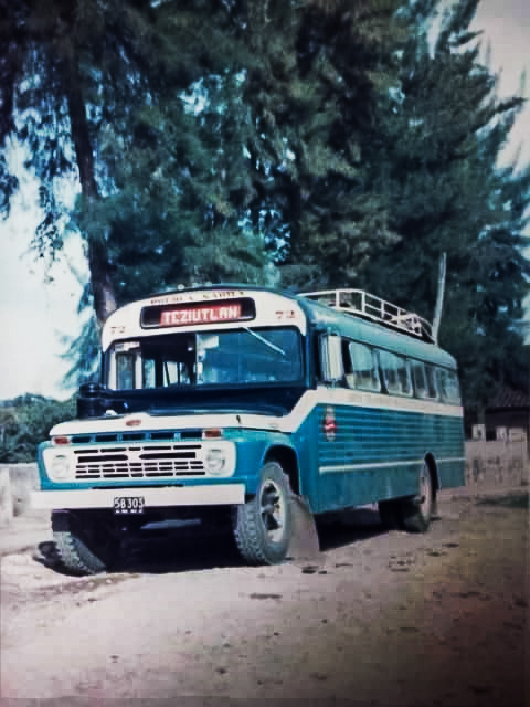 " Ford capre Convencional 1967, jpeg".